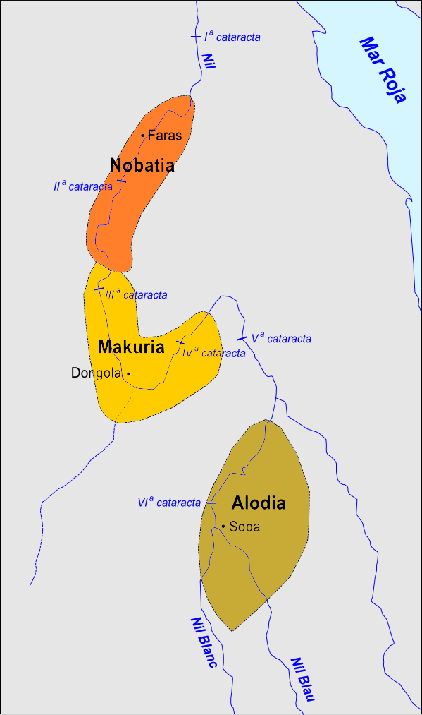 Reiaumes nubians de l'Edat Mejana Auta.